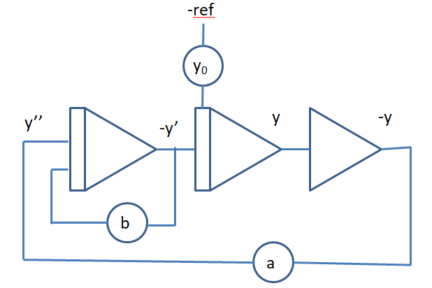 exemple des connections à réaliser entre les opérateurs d'un calculateur analogique pour la résolution de l'équation d'un résonateur: y' = -ay -by